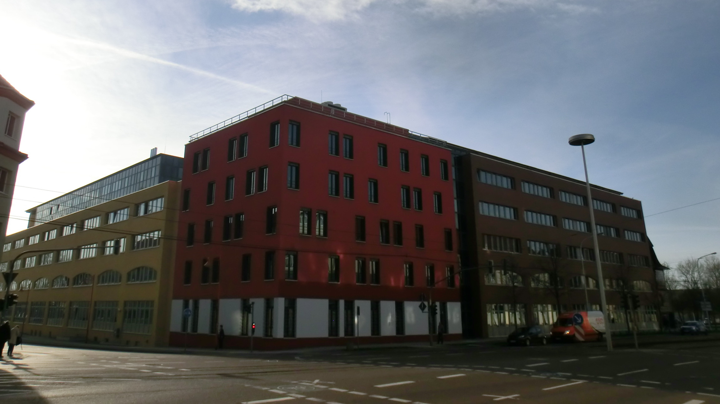 Justizzentrum Halle in Halle (Saale), Thüringer Straße 16 / Merseburger Straße 63